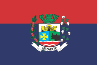 Bandeira